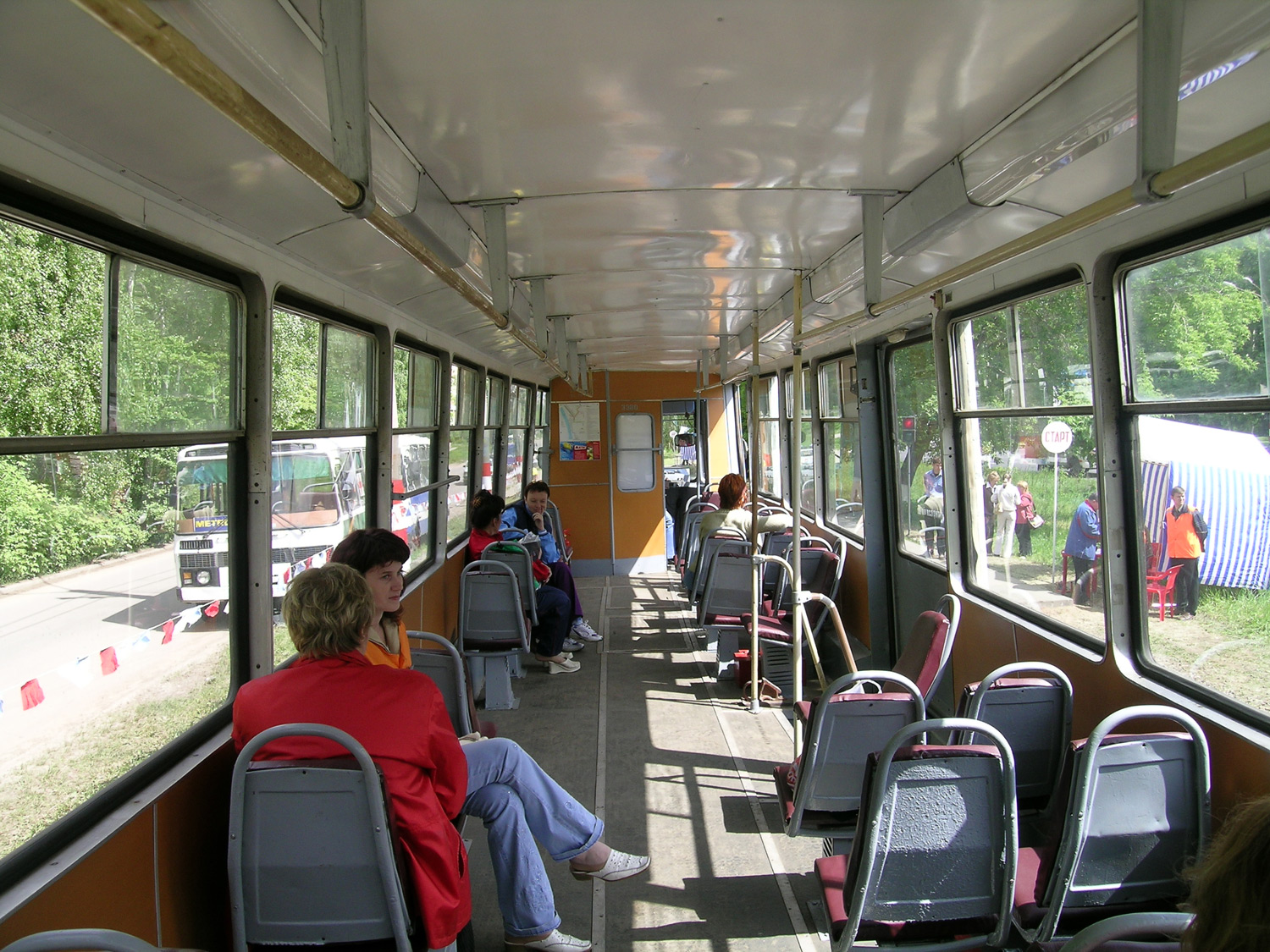 Трамвайный вагон 71-605 (КТМ-5). Вид в переднюю часть пассажирского салона.